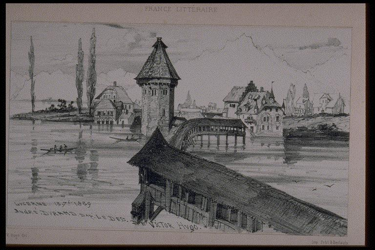 France Littéraire, Paris Imp. Petit & Bertauts Paris Challamel Editeur; Druckgrafik: Lithografie; Bild 10,8 x 17,6 cm, Blatt 22,7 x 30,1 cm